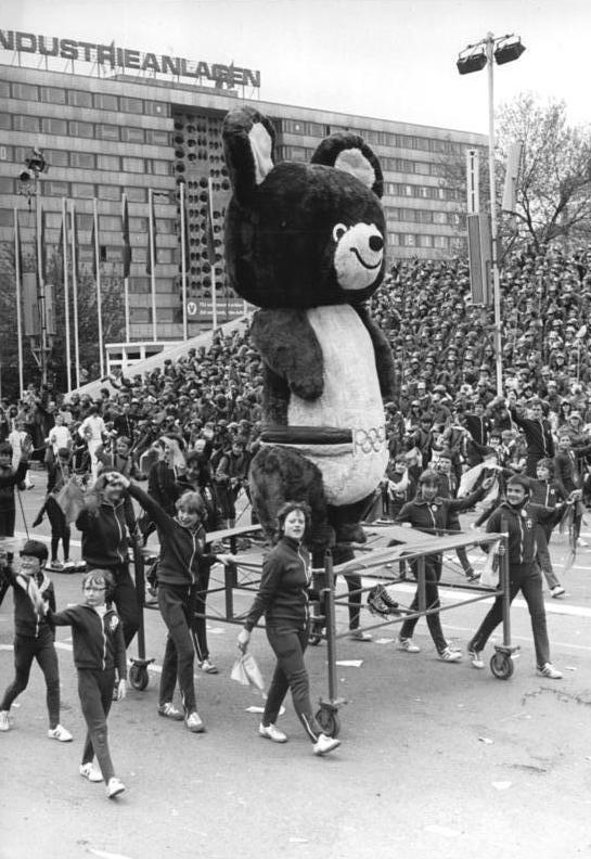 ADN-ZB-Thieme-25.5.1980-pe-Karl-Marx-Stadt: Festival-Ein großer Mischka marschierte mit bei der Kampfdemonstration Dynamo-Sportler grüßten damit die bevorstehenden Olympischen Spiele in Moskau.